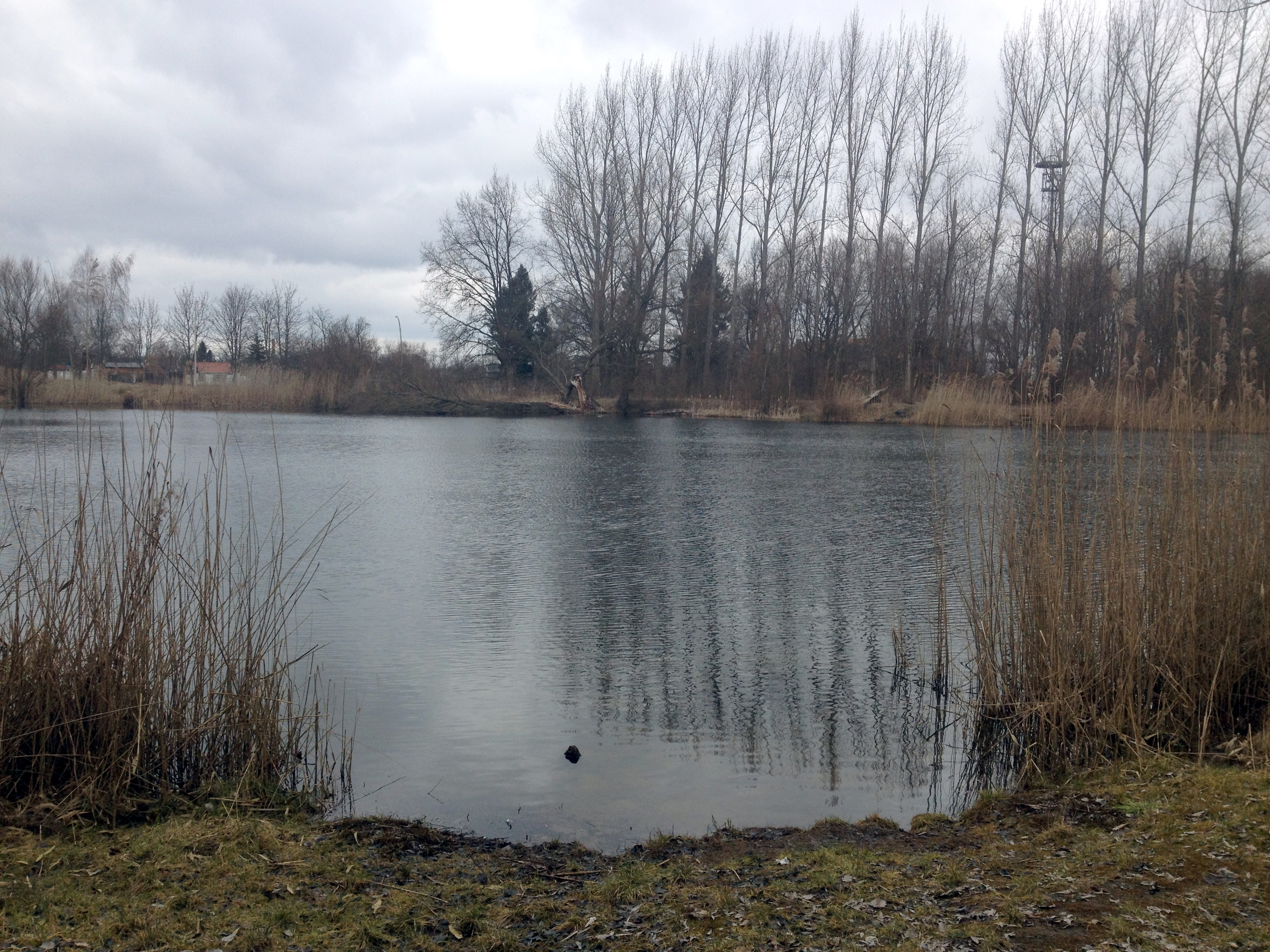 Westkreuzteich in Frankfurt (Oder), Deutschland